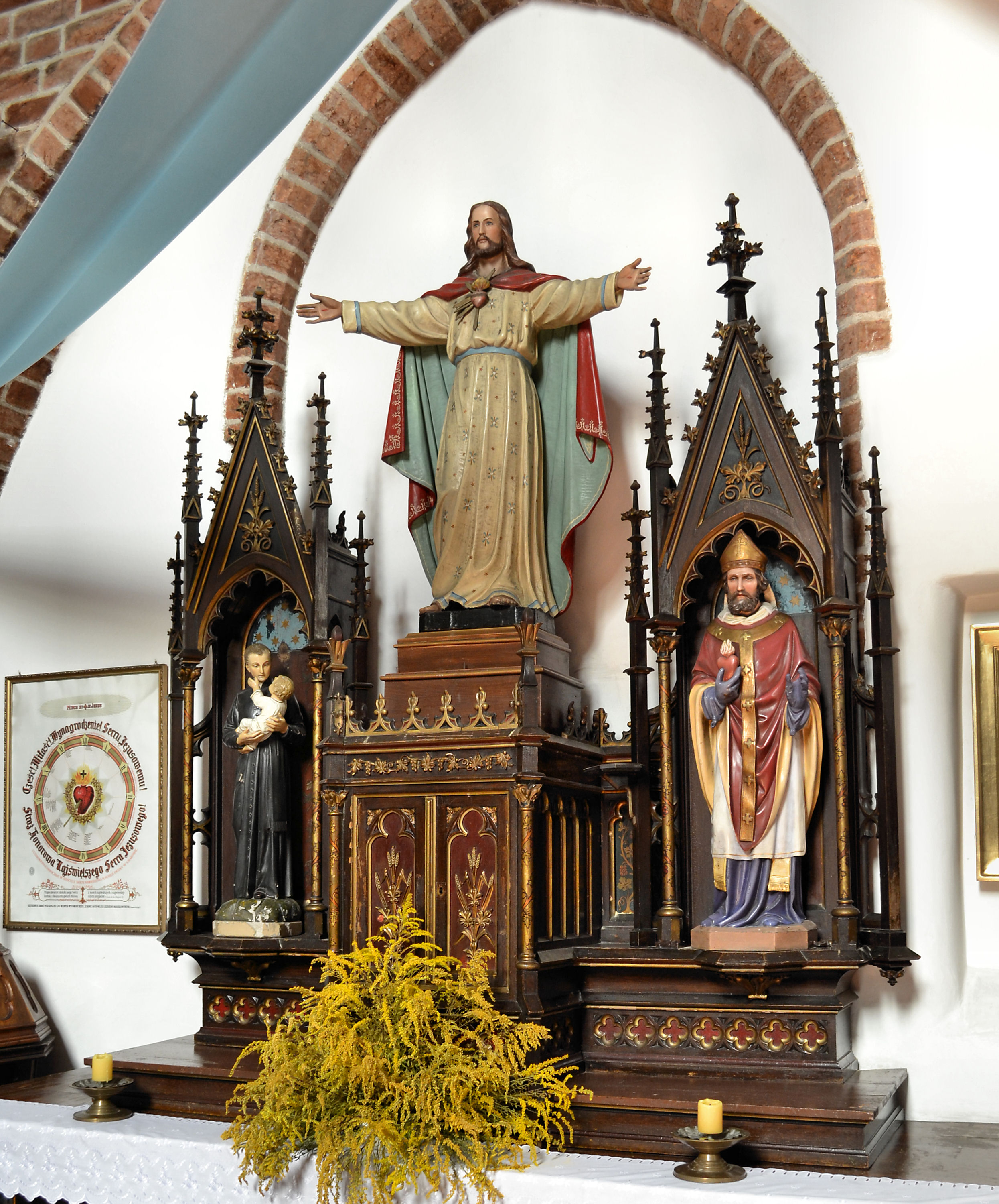 Marianowo - zespół klasztorny cystersów